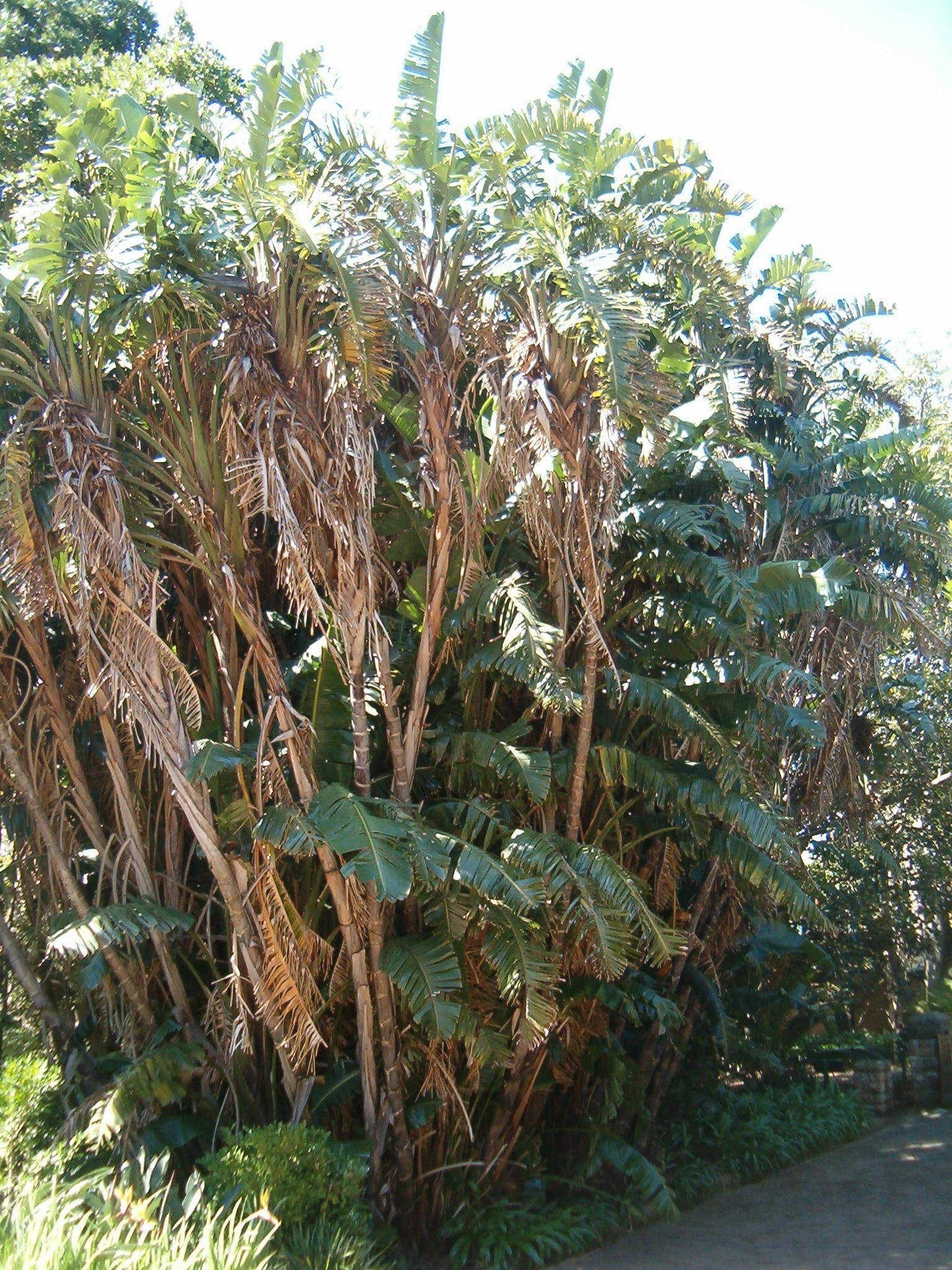 At Kirstenbosch National Botanical Gardens Genus Strelitzia""